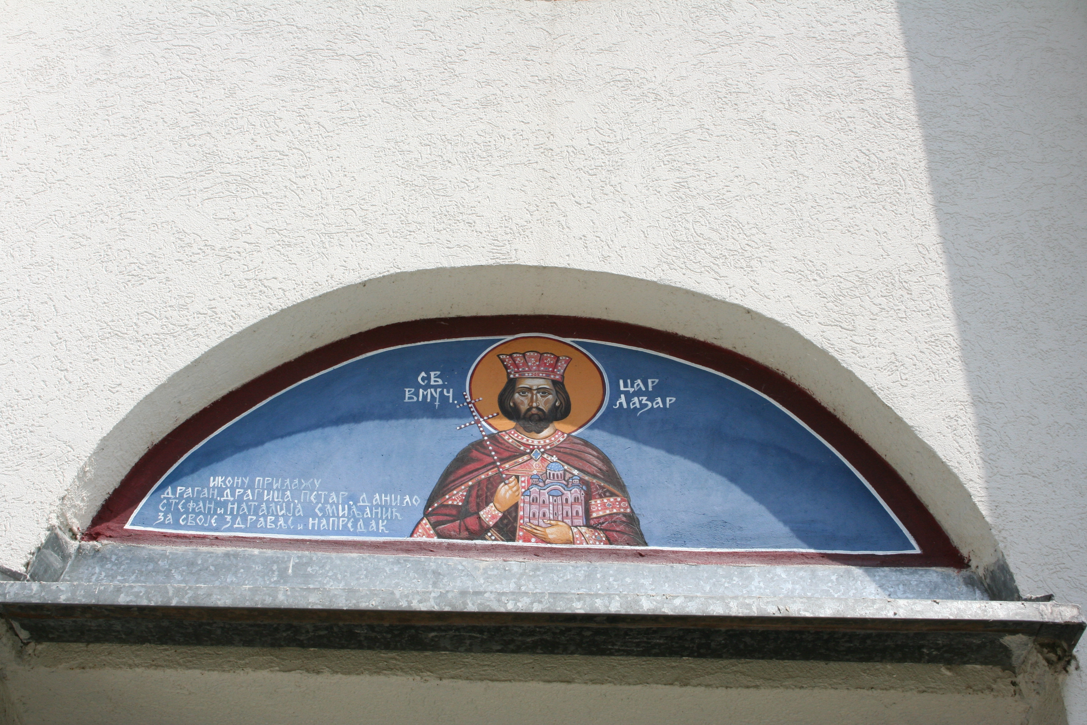 Crkva Sv. Lazara, Velika Reka